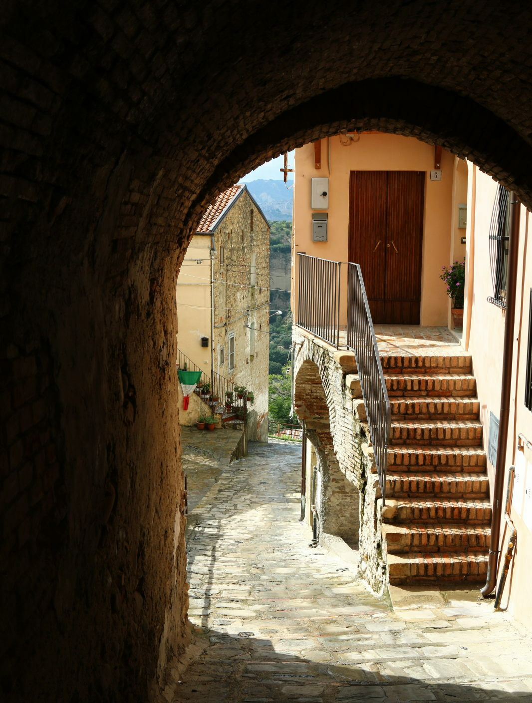 Scorcio del centro storico